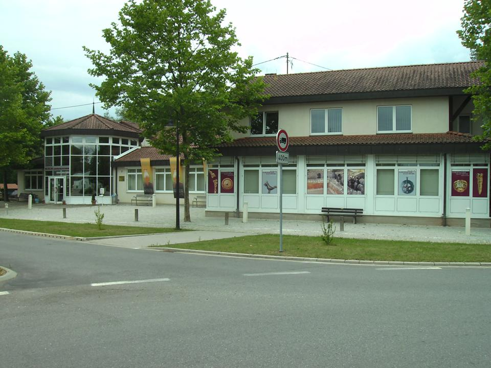 Reinheim (Gersheim): Museum des Europäischen Kulturparks Bliesbruck-Reinheim